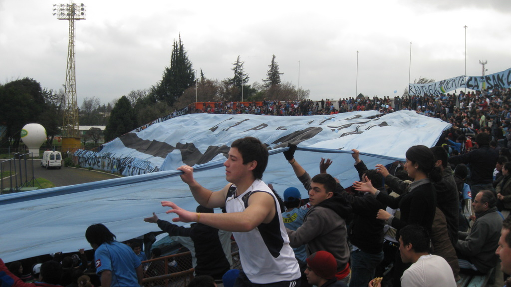 Capo de Provincia